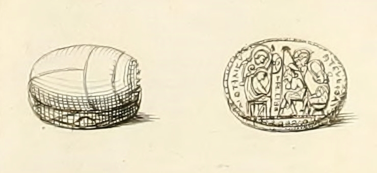 Antonio Francesco Gori: Storia antiquaria etrusca. Firenze 1749. Tav. VIII pag. 133: Scarabeo etrusco (Stosch’scher Stein)